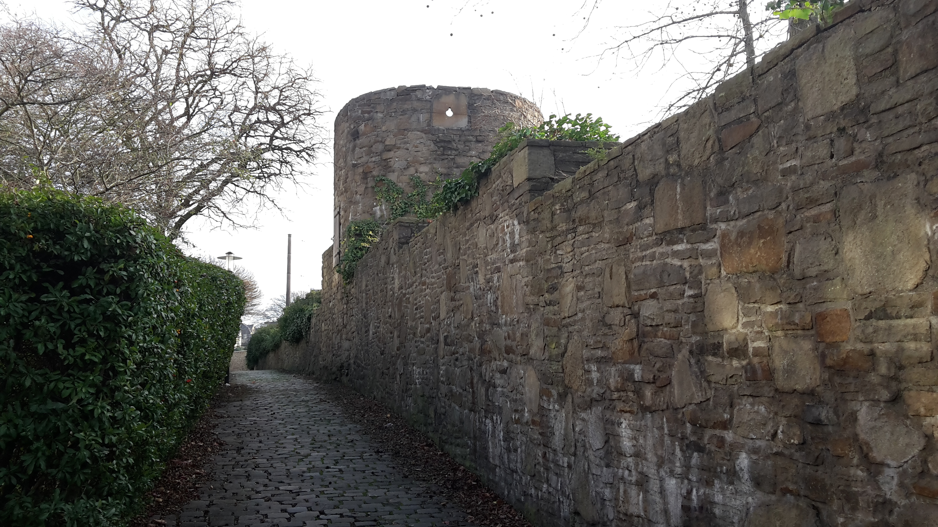 Bruchtorturm, innerhalb der Stadtmauer